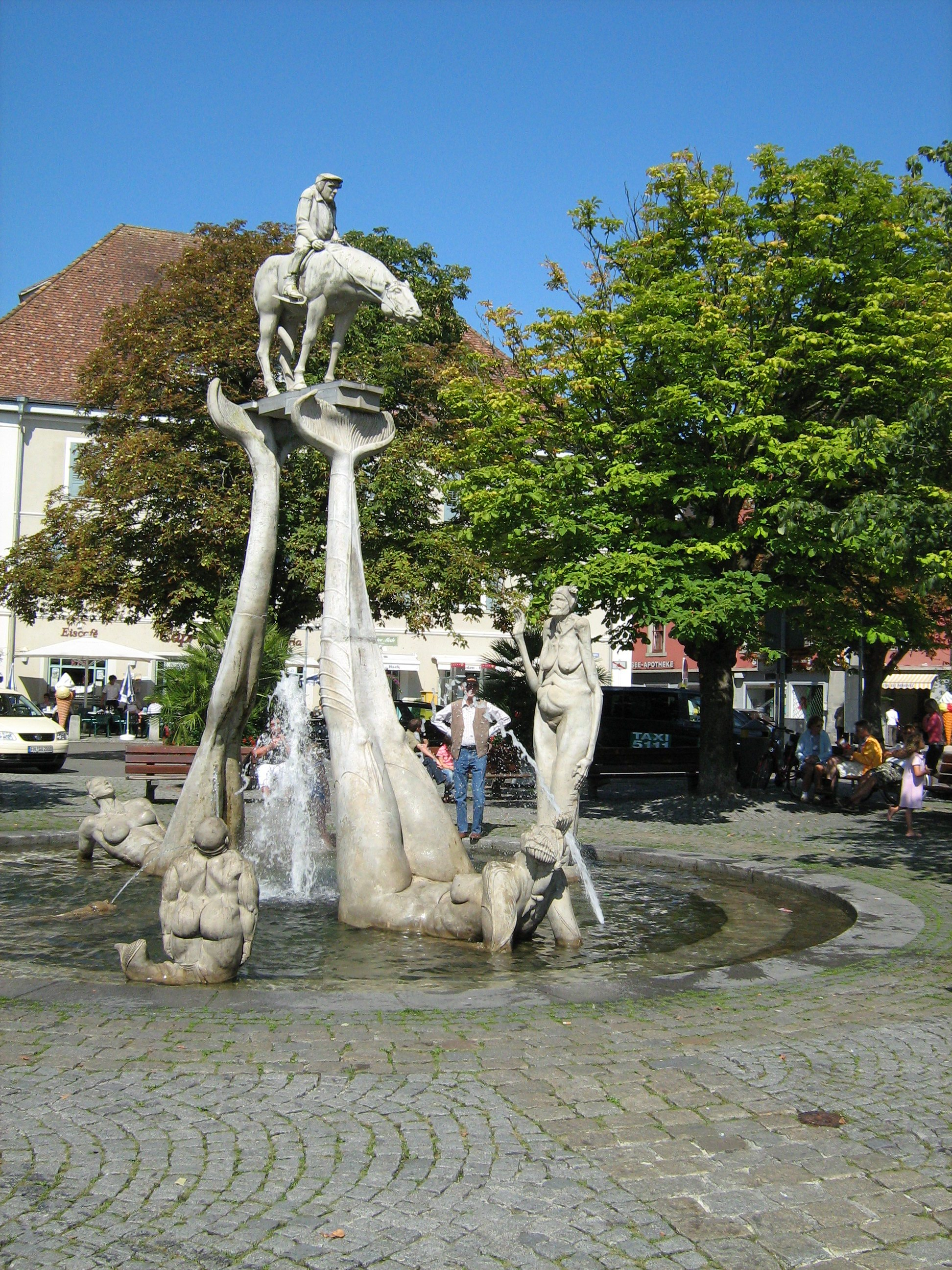 Brunnen Skulptur in Überlingen 2007